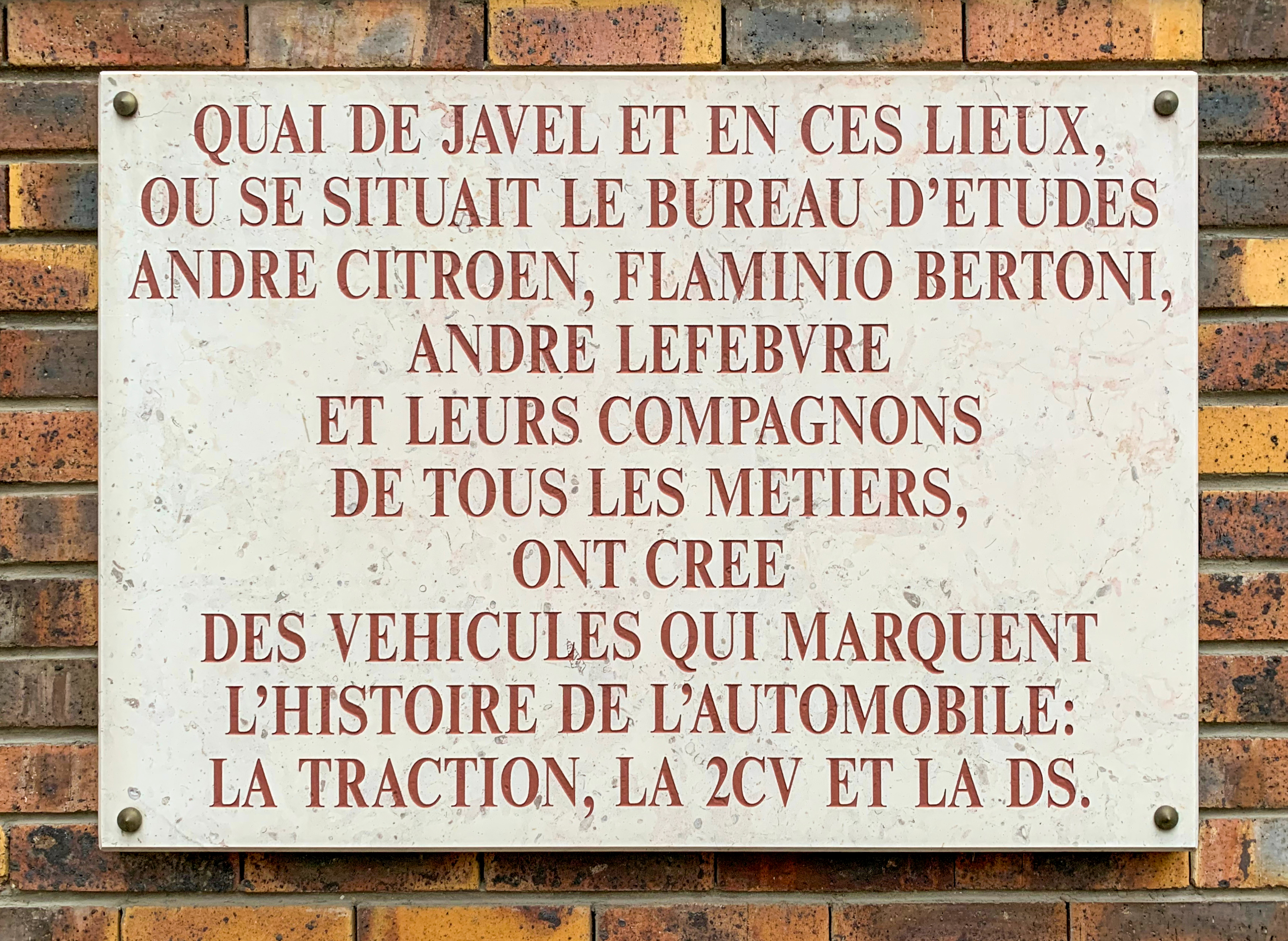 Plaque indiquant l'ancien emplacement du bureau d'études de Citroën où furent conçues des voitures mythiques, 44 rue du Théâtre (Paris).